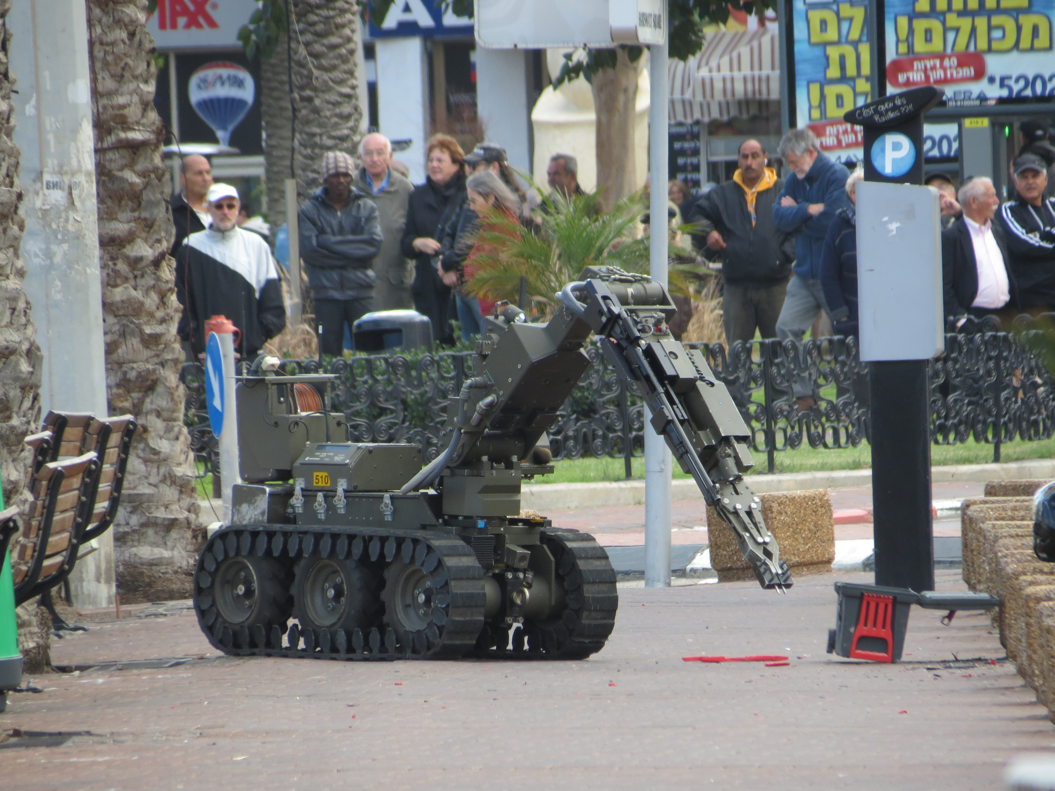 רובוט משטרתי לטיפול בפצצות מטפל בארגז כלים ריק שנשכח לו בככר העצמאות, נתניה.